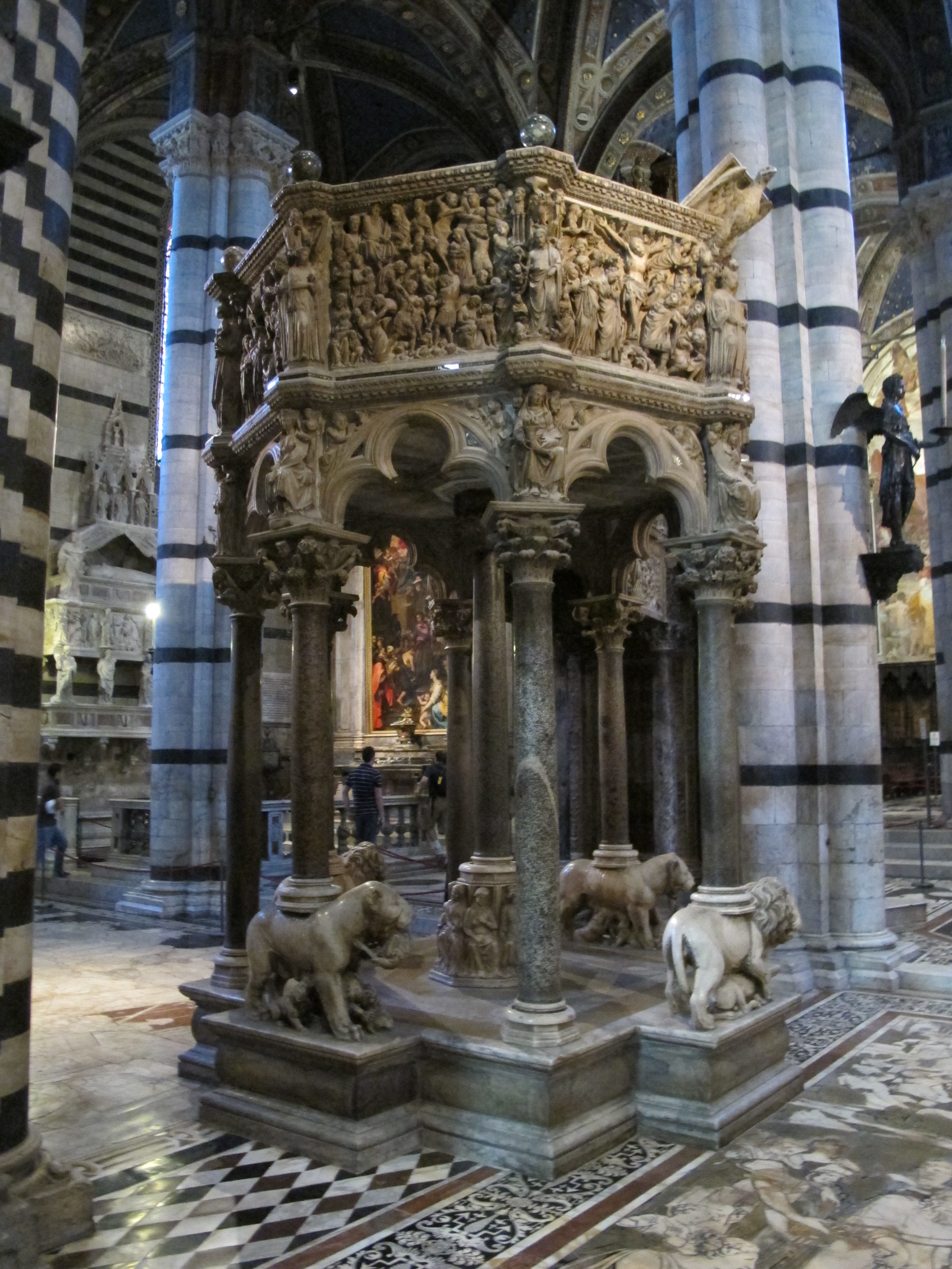 Pulpito del duomo di siena